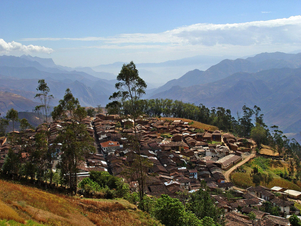 Vista usquil, desde la cruz